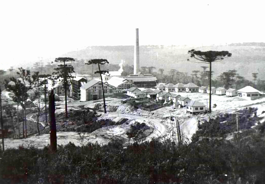 Foto histórica da unidade da Klabin de Monte Alegre, em Telêmaco Borba, no Paraná.